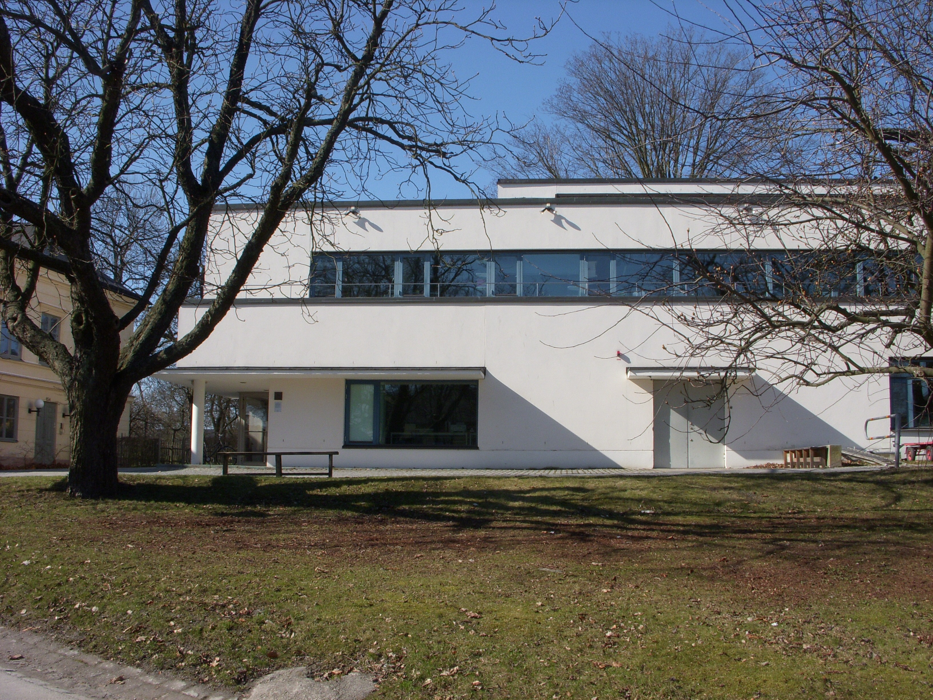 Arkitekturmuseet på Skeppsholmen (administrationsbyggnad)